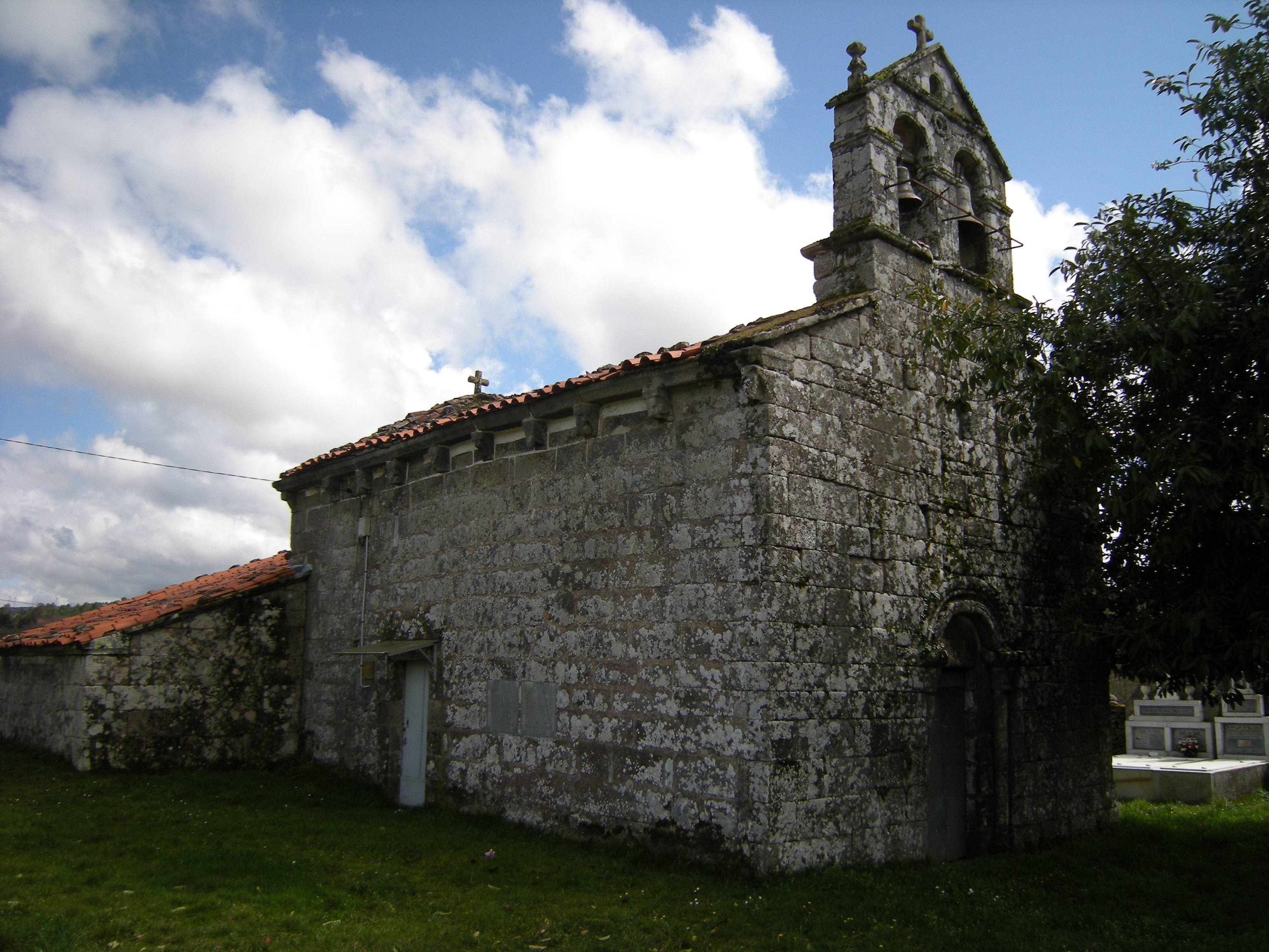 Igrexa de San Pedro de Ferreiroa, Agolada